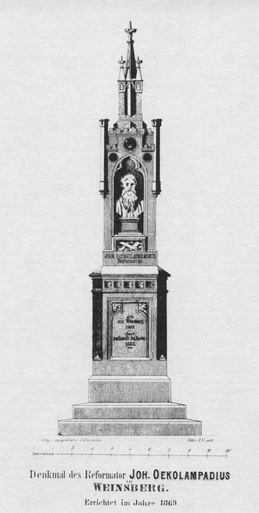 Entwurf des Oekolampadius-Denkmals in Weinsberg, das zur Errichtung 1869 vorgesehen war und schließlich 1871 eingeweiht wurde.